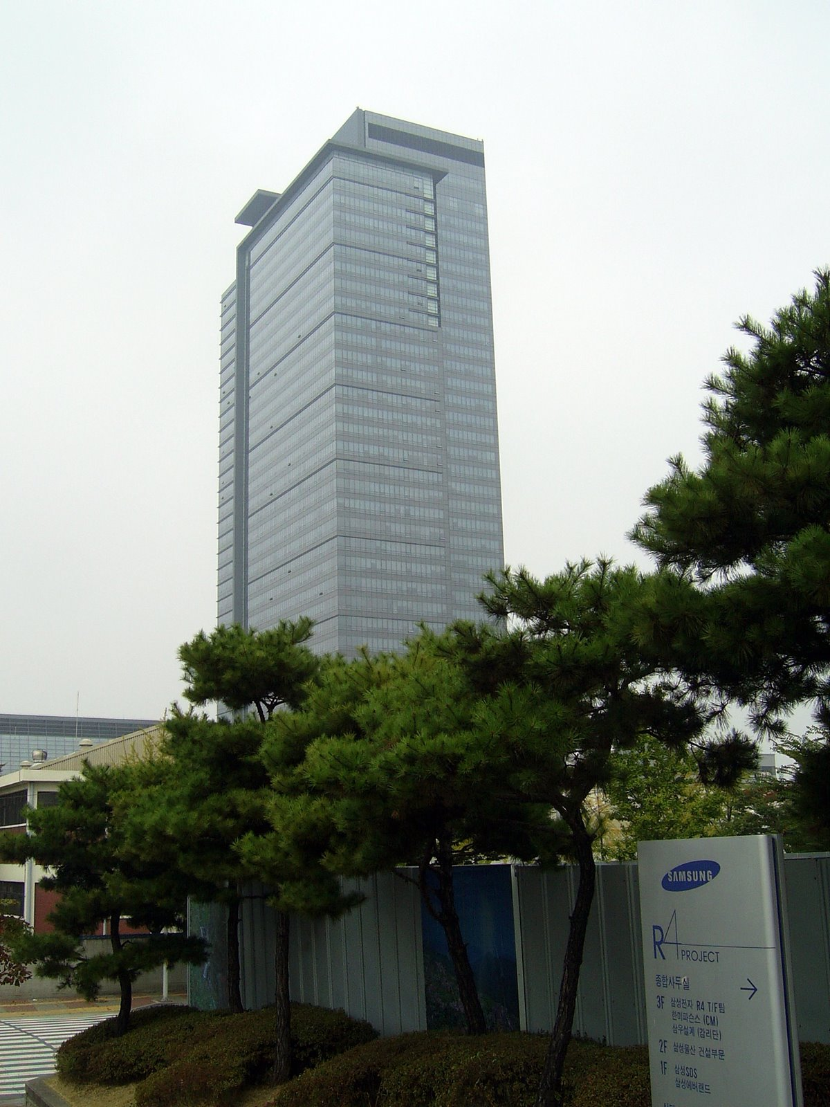 Samsung Digital Complex, Suwon